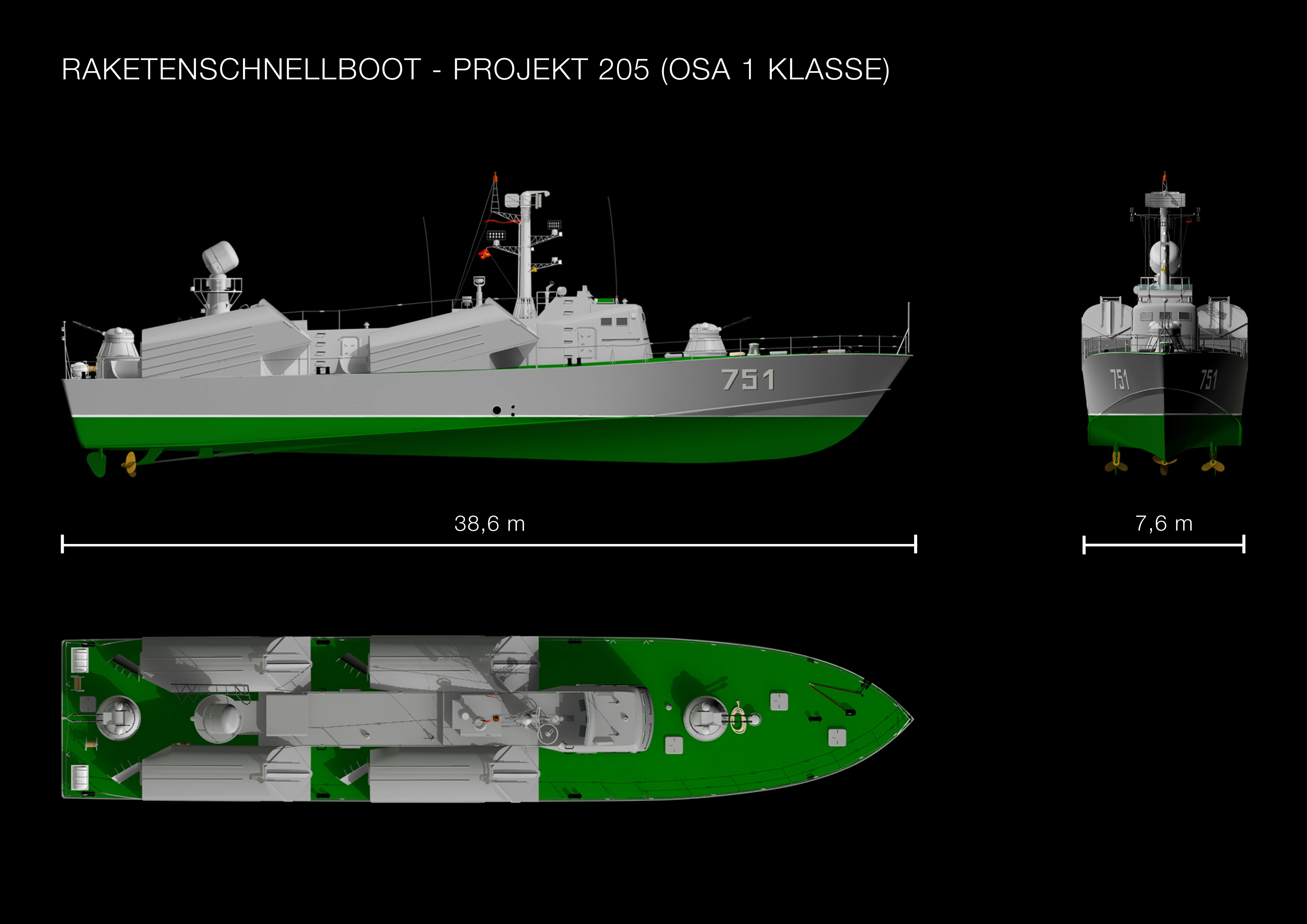 Typenblatt eines sowjetischen Raketenschnellbootes